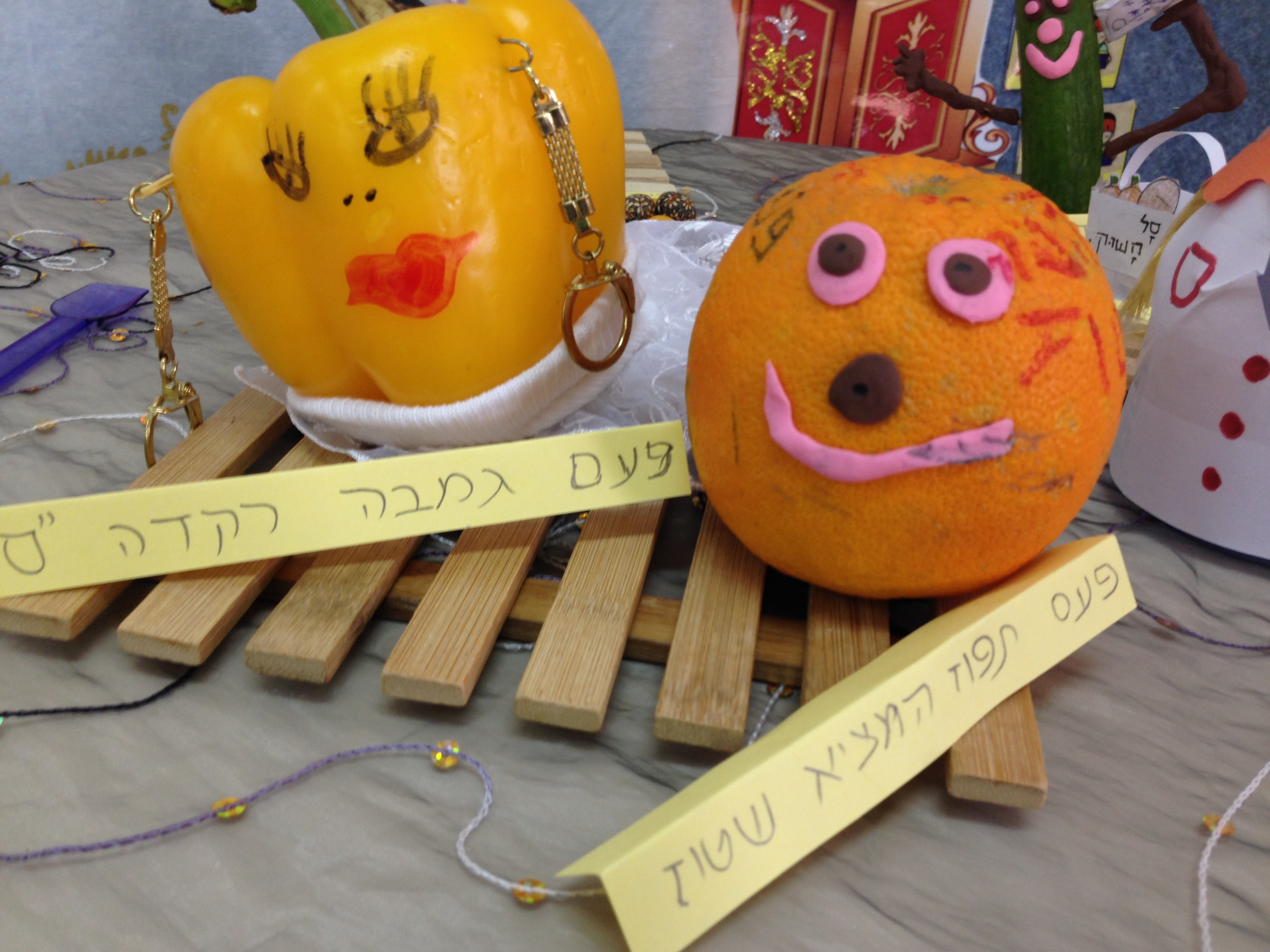 שטוזים מפוסלים ברוח הספר "ספר השטוזים של דתיה"